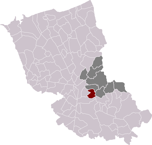 Locatie gemeente Sint-Silvesterkappel in arrondissement Duinkerke. Zelfgemaakt. Location of Saint-Sylvestre-Cappel municipality in the arrondissement of Dunkirk. Self made. Localisation de la commune de Saint-Sylvestre-Cappel dans l'arrondissement de Dunkerque. Fait moi-même.